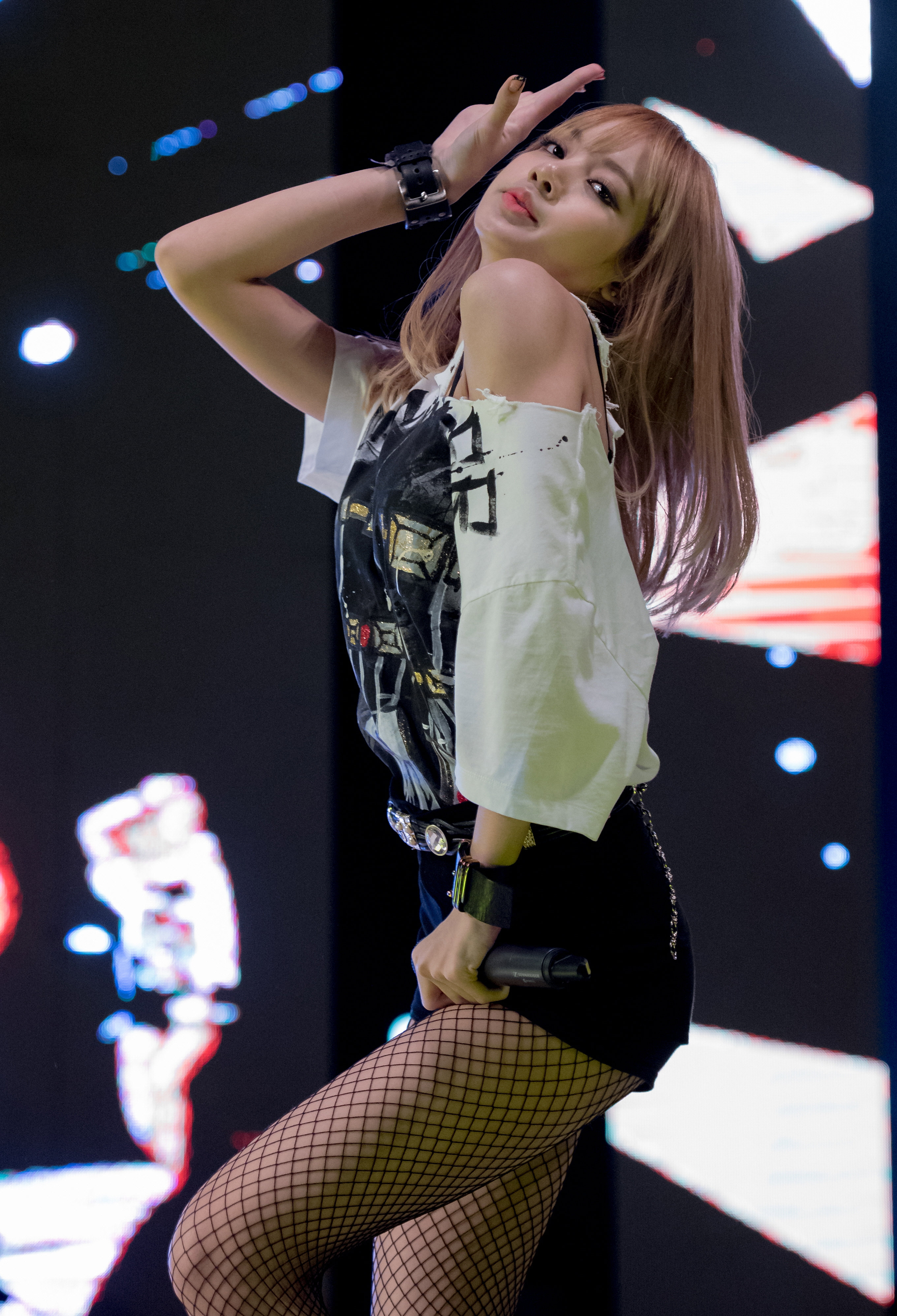 (17.05.17) 블랙핑크 리사